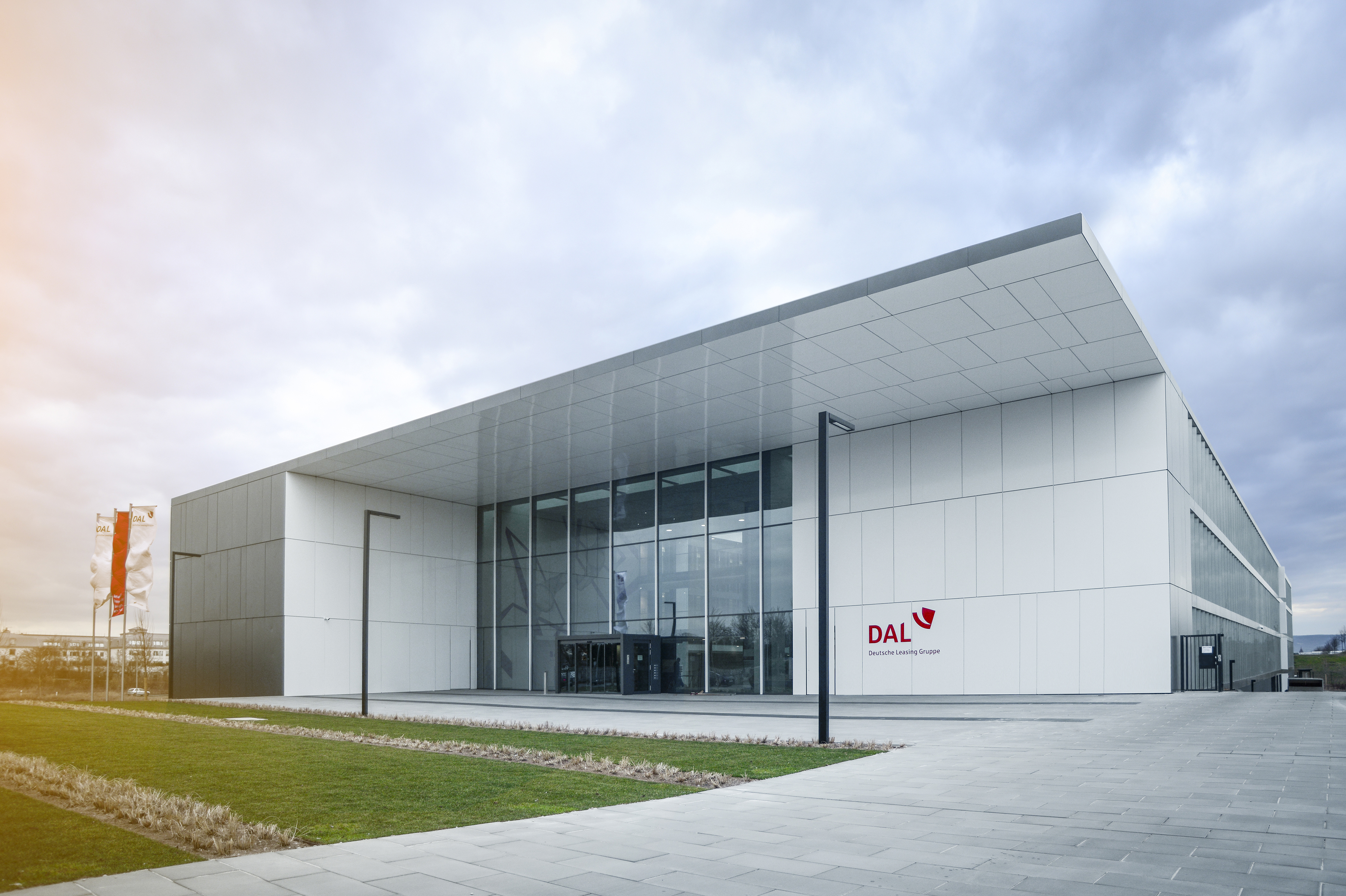 Die im März 2017 bezogene Hauptverwaltung der DAL in Mainz-Hechtsheim